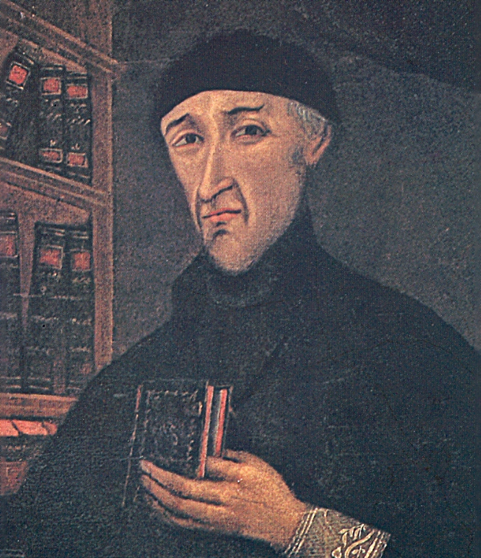 Toribio Rodríguez de Mendoza, rector de la Universidad de San Marcos